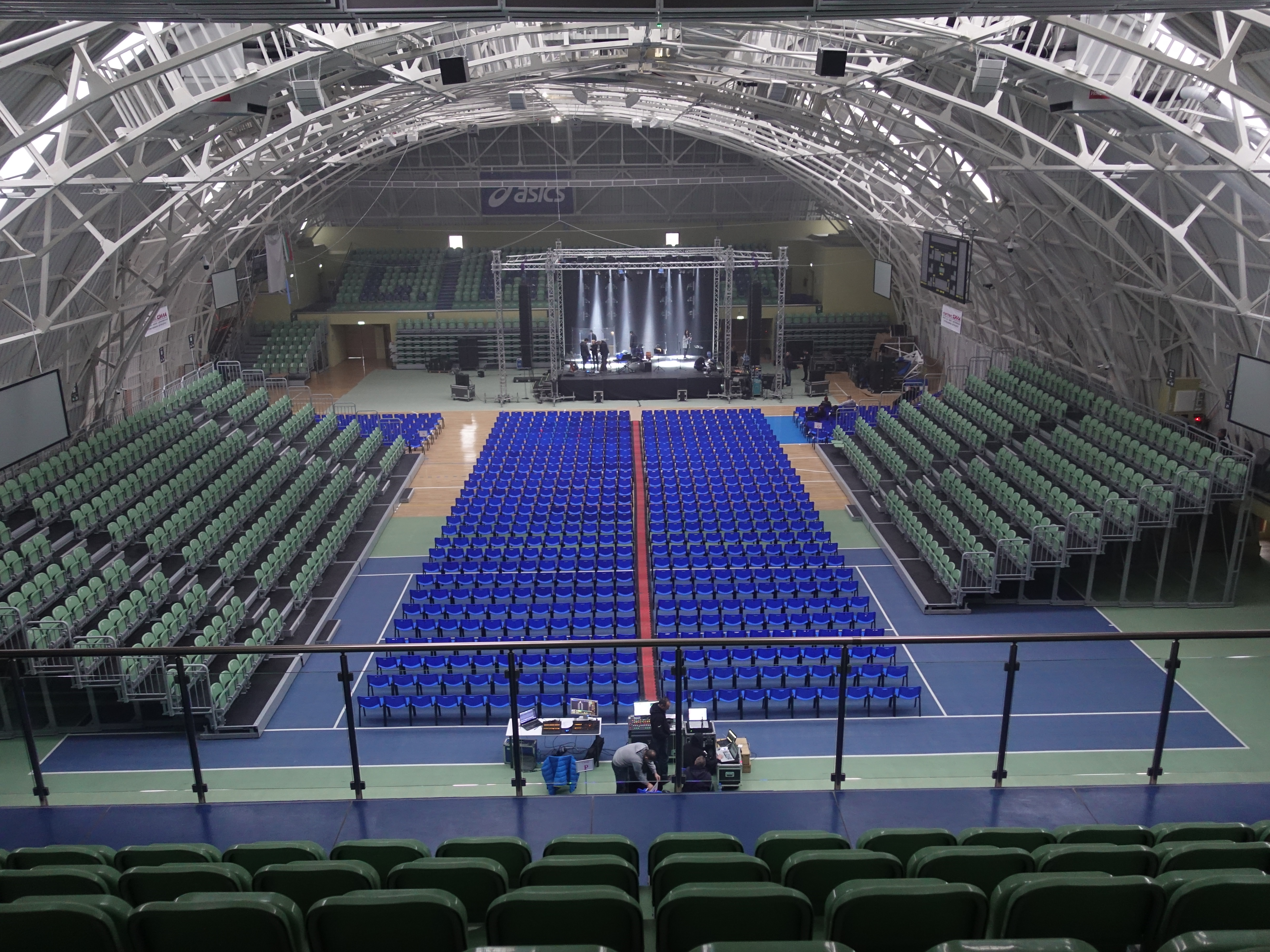 Залата на Комплекс С.И.²Л.А. - примерна подредба за концерти